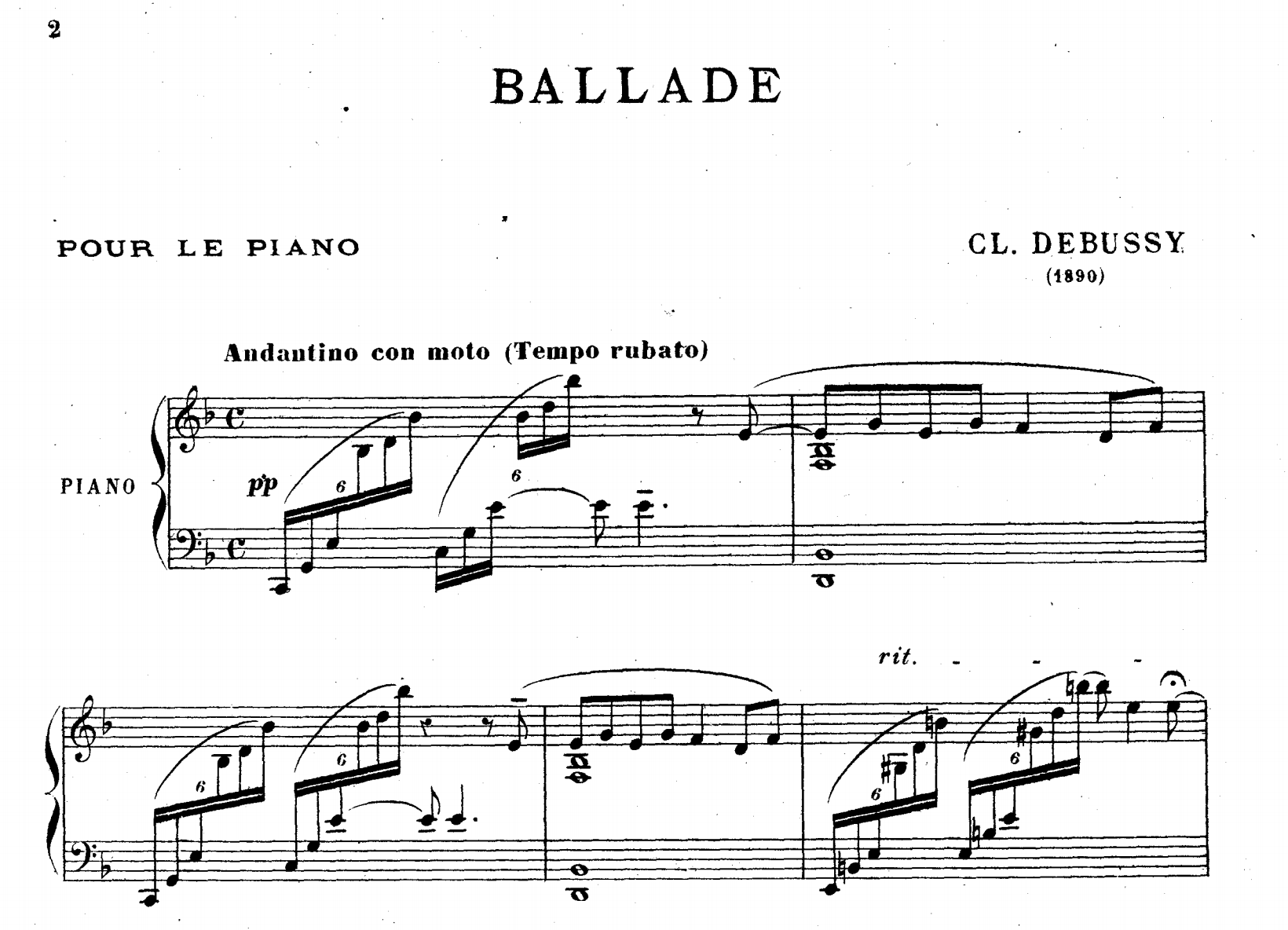 Premières mesures de Ballade, de Claude Debussy.